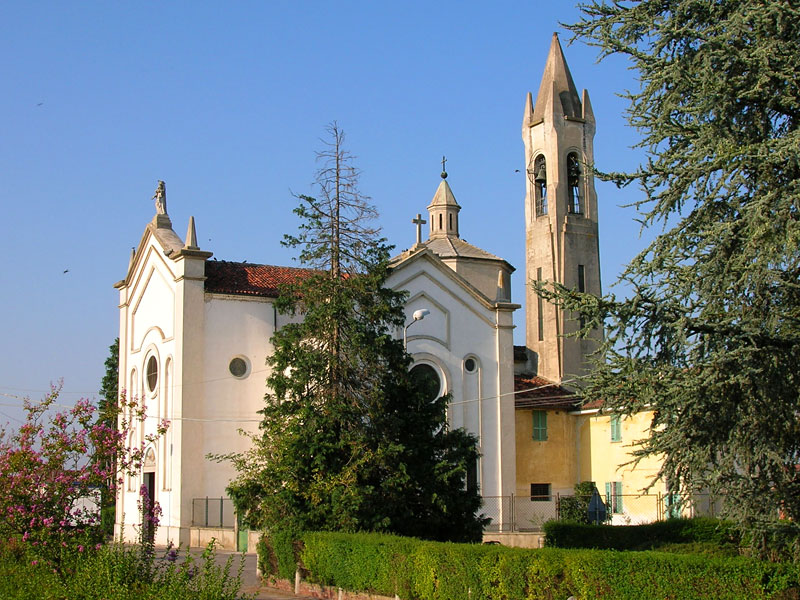 Il Santuario della Crocetta di Vespolate foto by Alessandro Vecchi Alessandro Vecchi - 2005